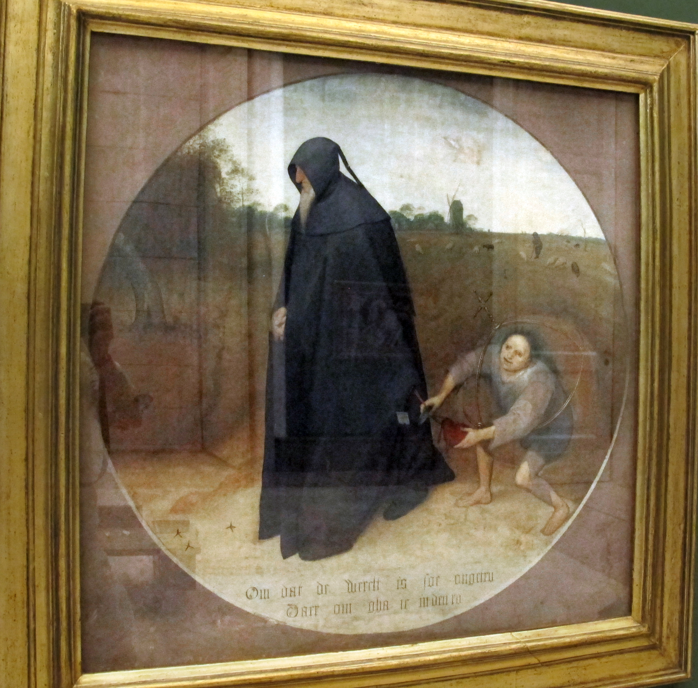 Galleria Farnese (Museo di Capodimonte)